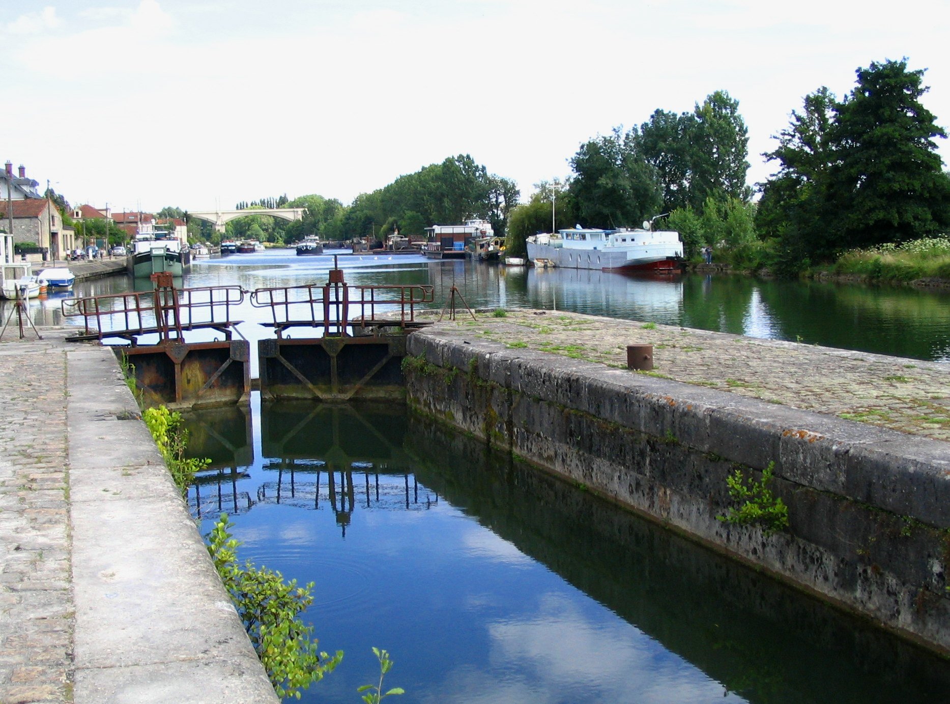 Port de Saint-Mammes - Seine et Marne - France